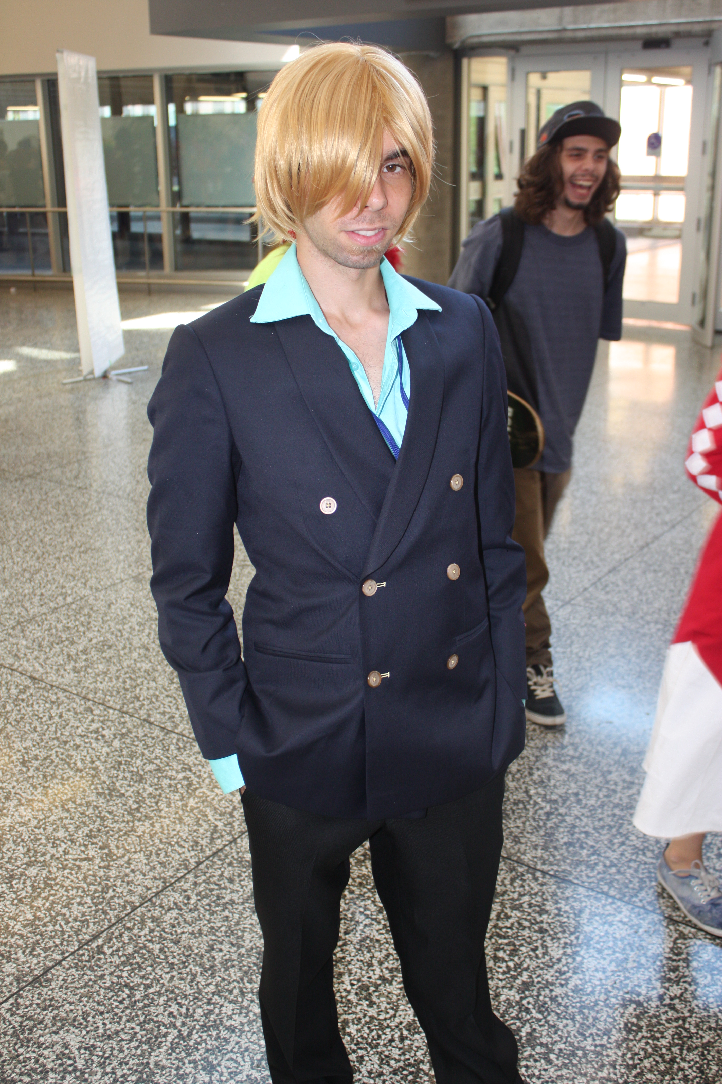 Otakuthon 2014: Sanji